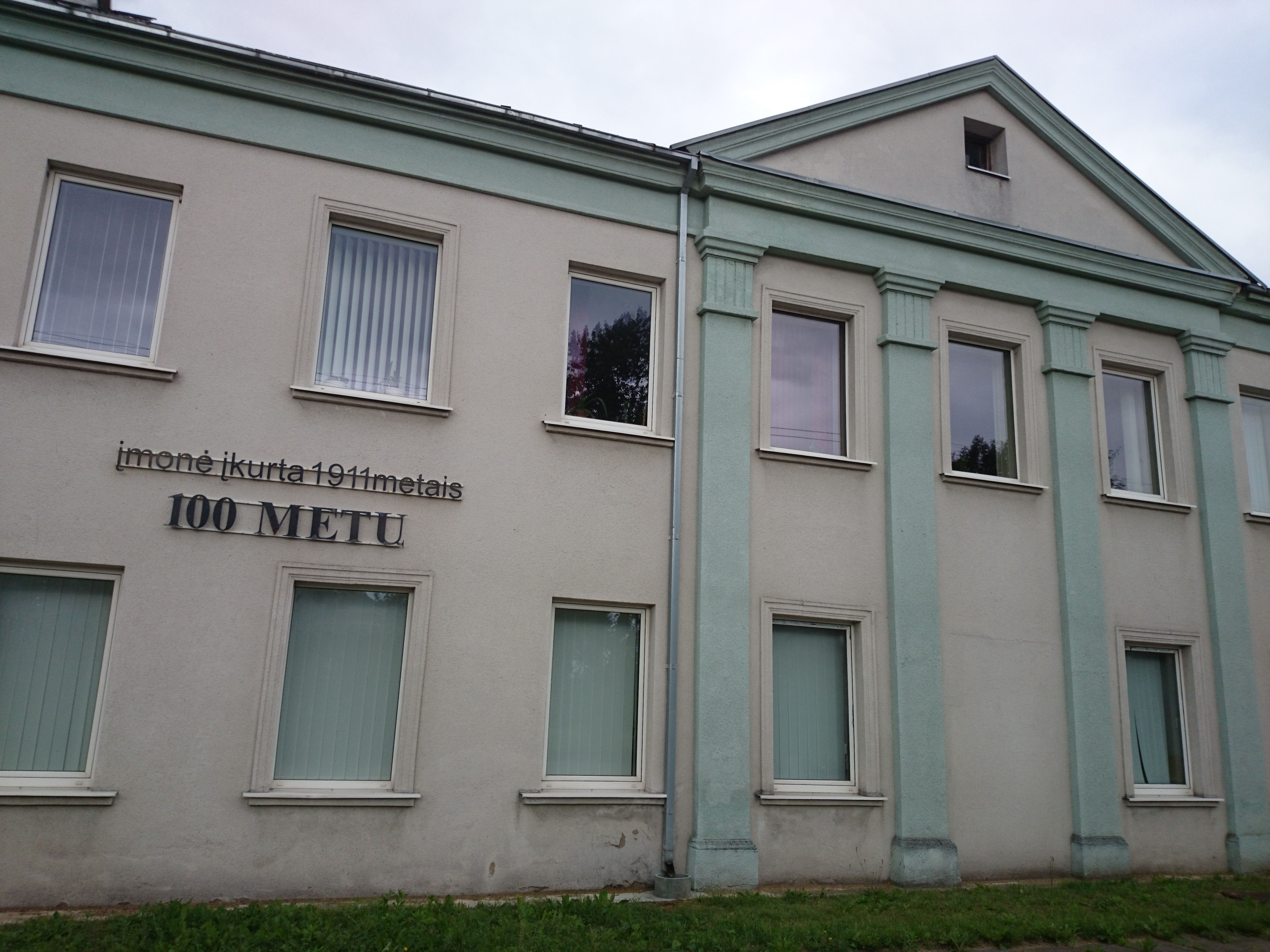 UAB Baldai Jums